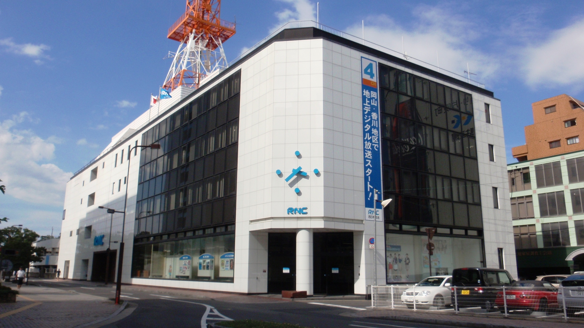 香川県高松市丸の内にある西日本放送の本社ビル。